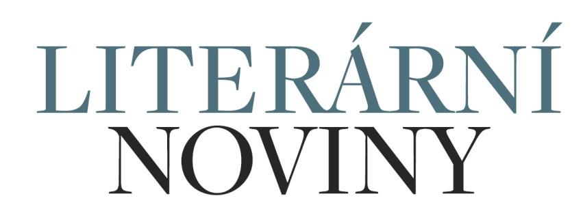 český měsíčník